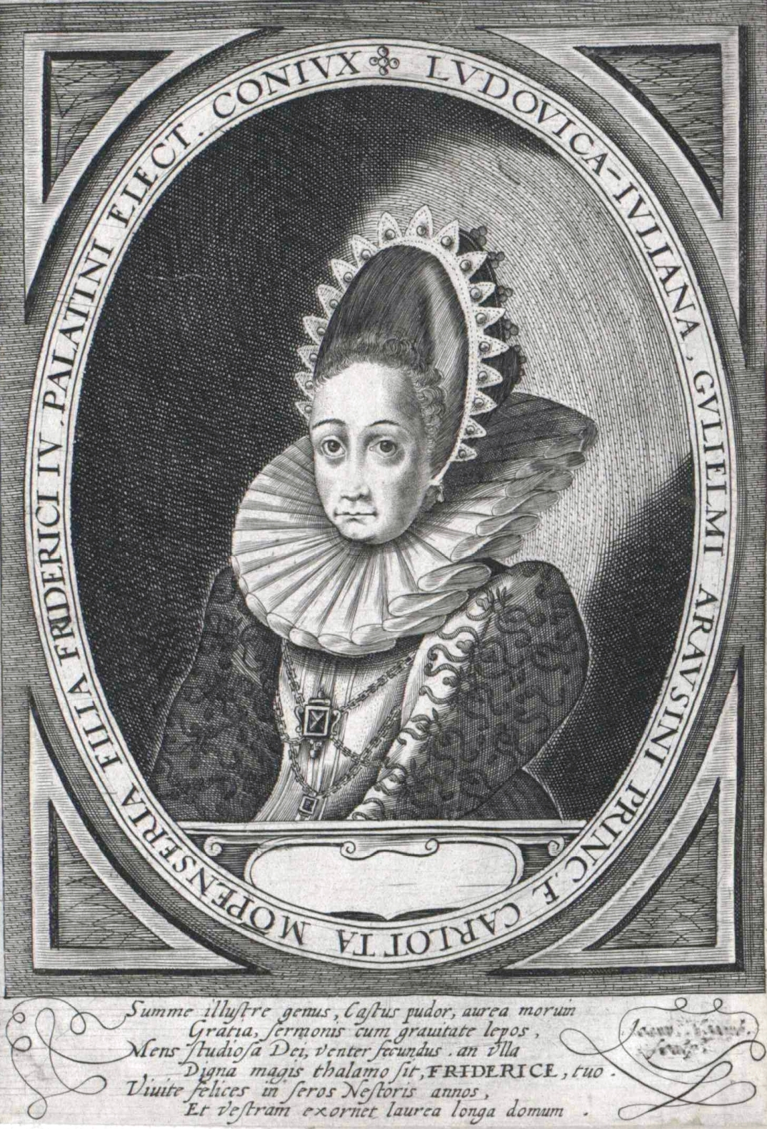 Luise Juliana von Oranien-Nassau (1576–1644)